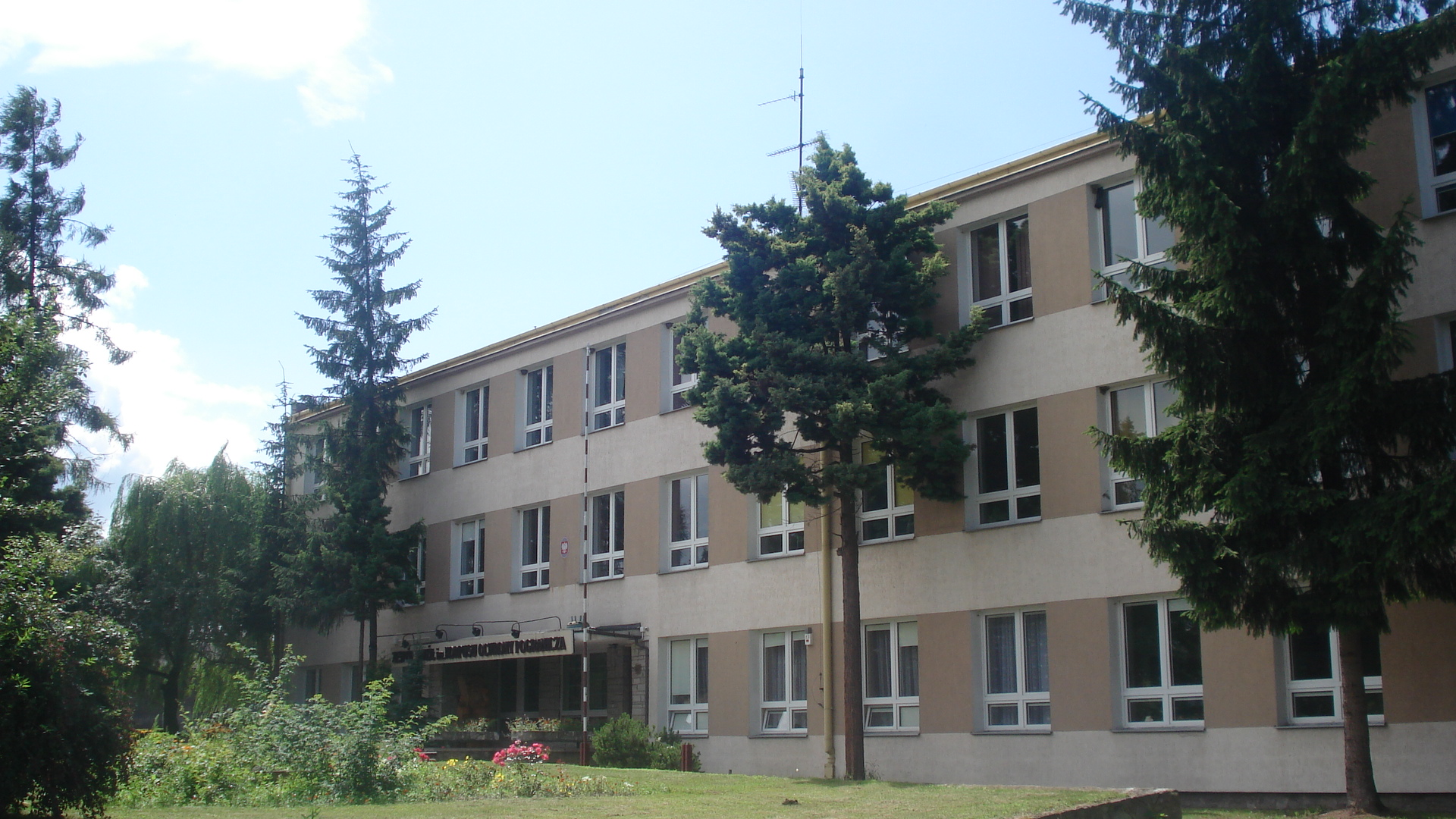 Zespół Szkół im. Korpusu Ochrony Pogranicza w Szydłowcu - budynek główny